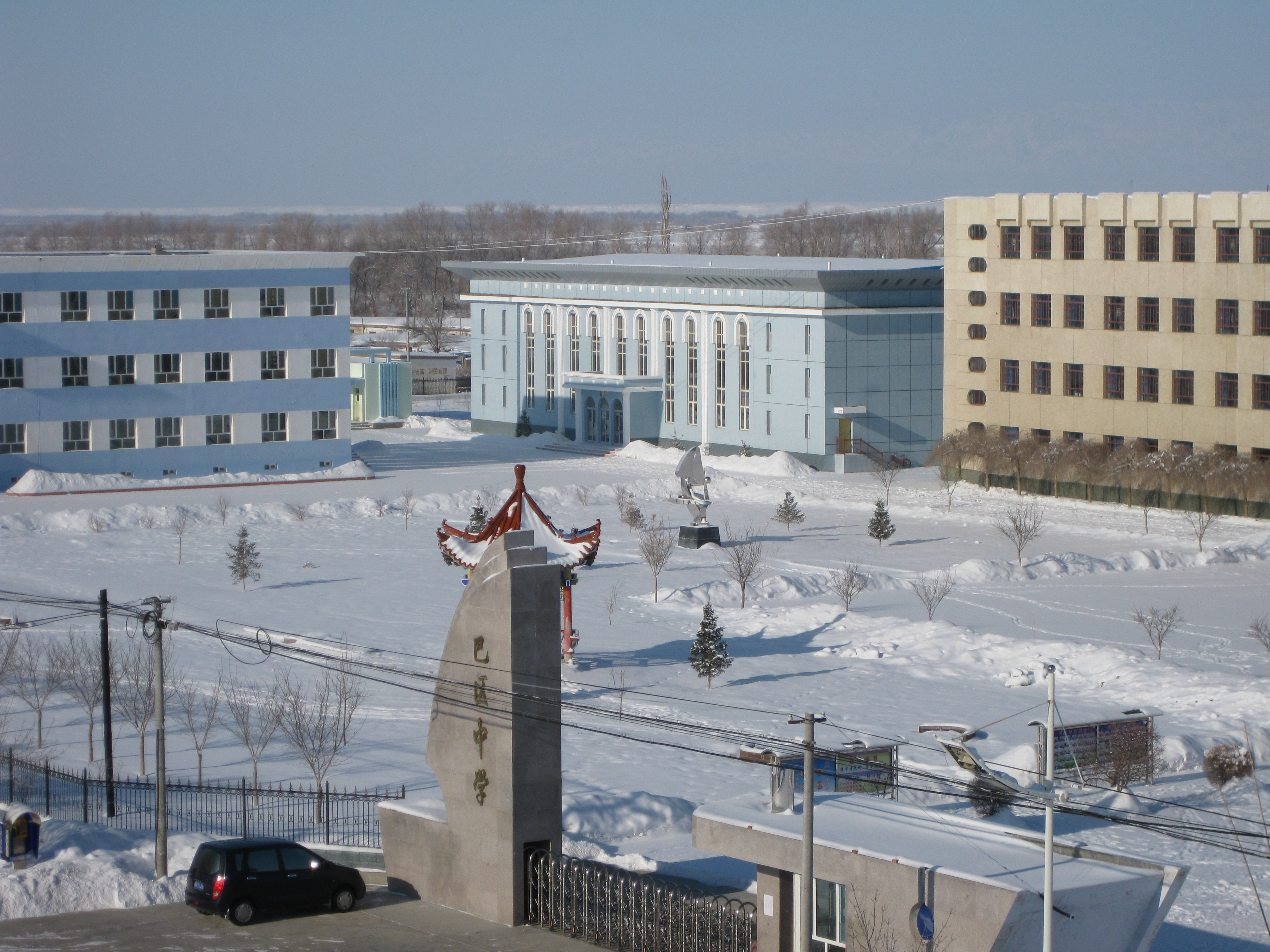 冬天的巴区中学校园